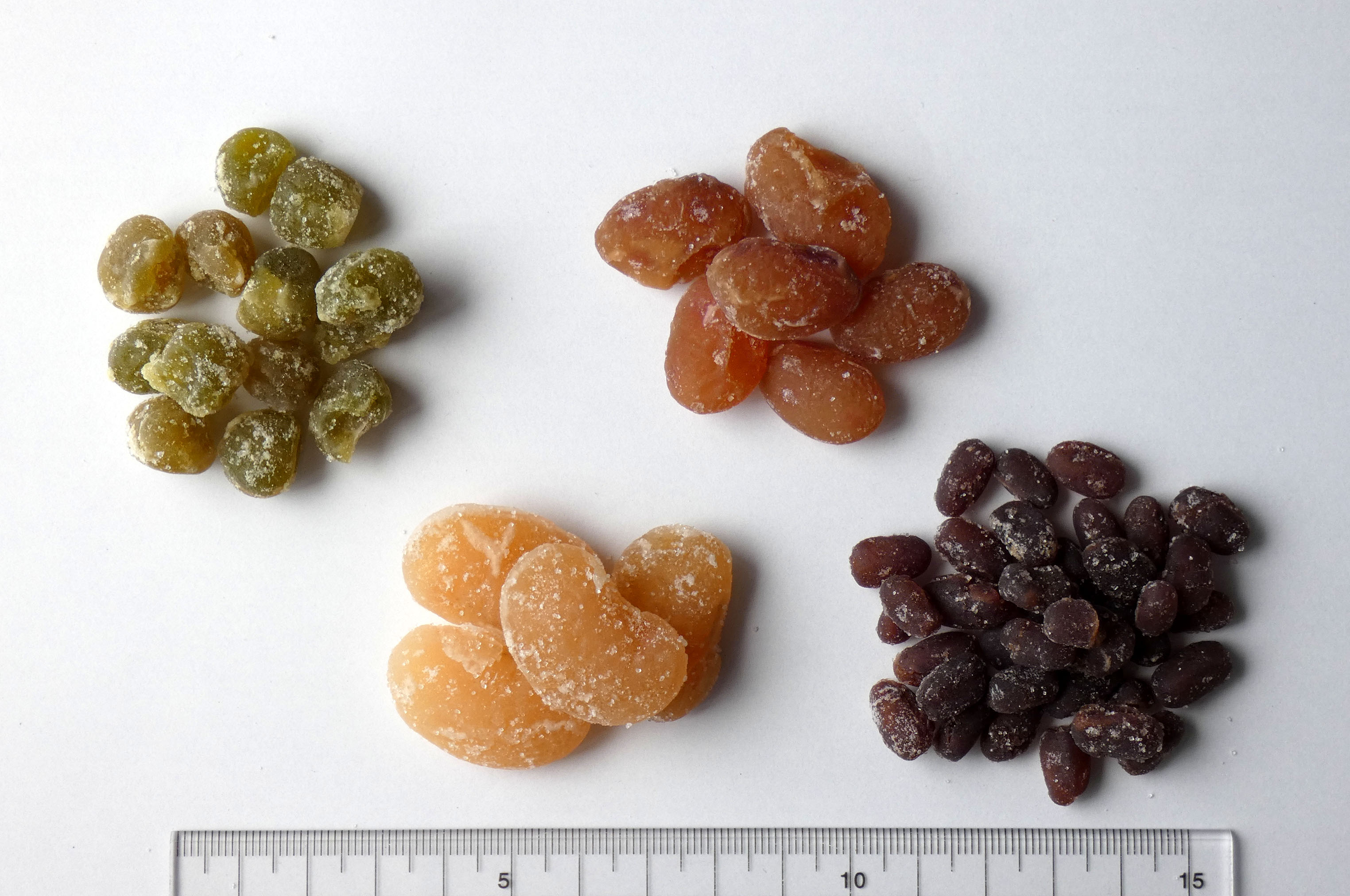 でん六の甘納豆（左から、うぐいす、白花、金時、小豆）